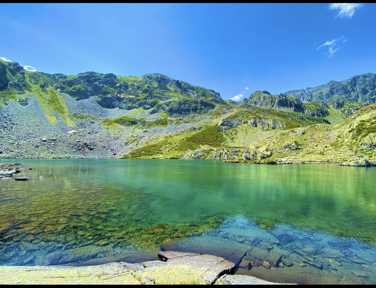 Altı parmak dağlarının en yüksek zirve noktasına çıkmadan önce bulunan göl. 3000 metrede bulunmaktadır. Yöre halkı buraya kara göl demektedir (Artvin ve çevresinde kara göl ismiyle birden fazla başka göl de bulunmaktadır)